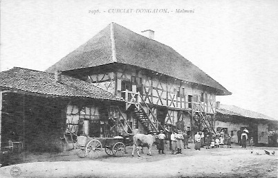 Manoir de Malmont à Curciat-Dongalon, Ain, France